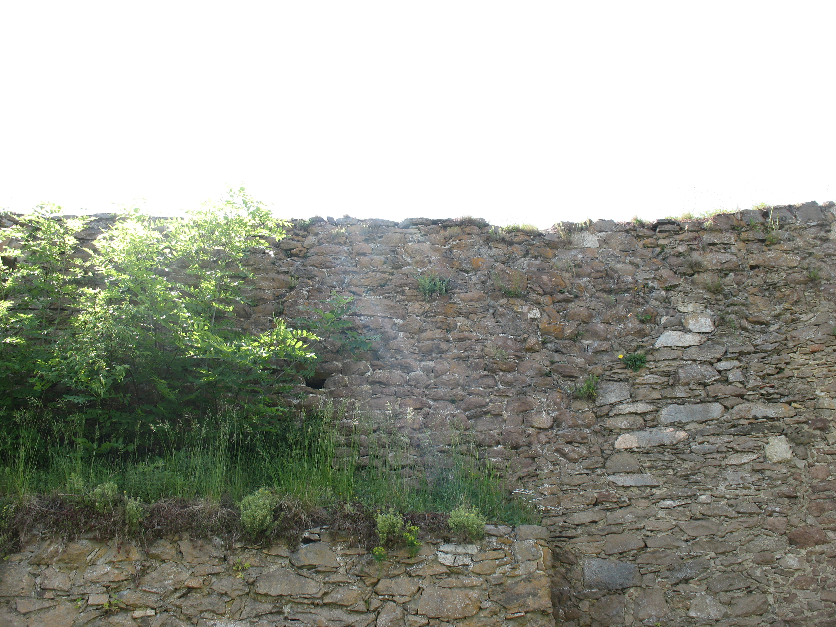 Die älteste Mauerpartie in der Bildmitte (vermutlich 14. oder 15. Jahrhundert). Die vorgelagerte Mauer war Teil eines Laubenganges und die hellen Steine rechts sind Flickwerk. Hier hatte sich eine Treppe befunden.